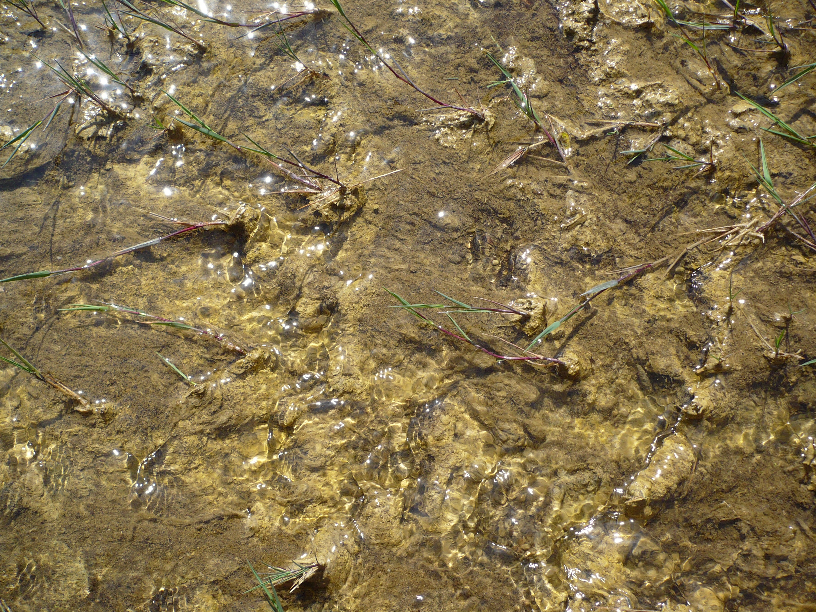 Pěnovcový mokřad na Podkrušnohorské výsypce